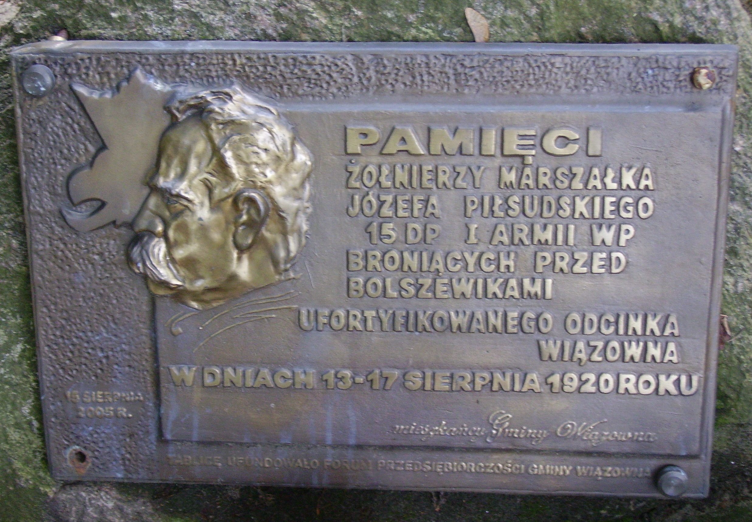 Wiązowna, tablica pamiątkowa pamięci żołnierzy 15 DP biorących udział w bitwie warszawskiej 1920 w okolicach Wiązowny.